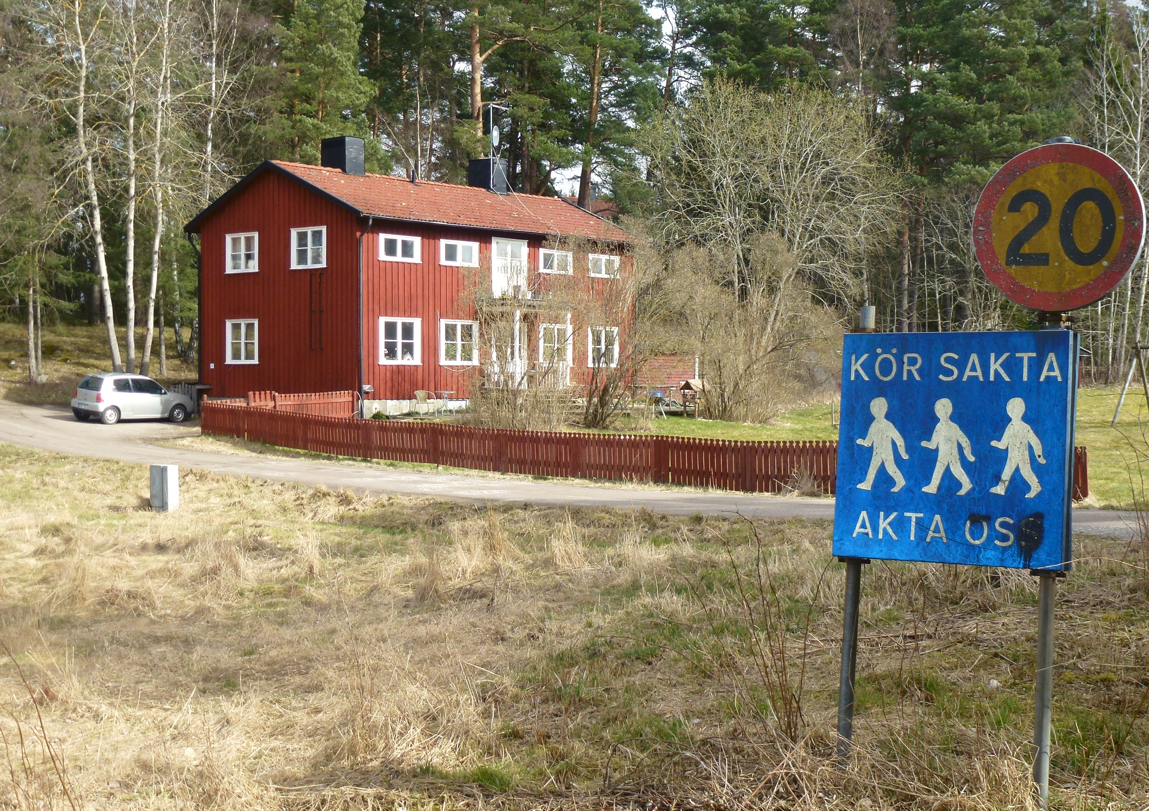 Barnbyn Skå